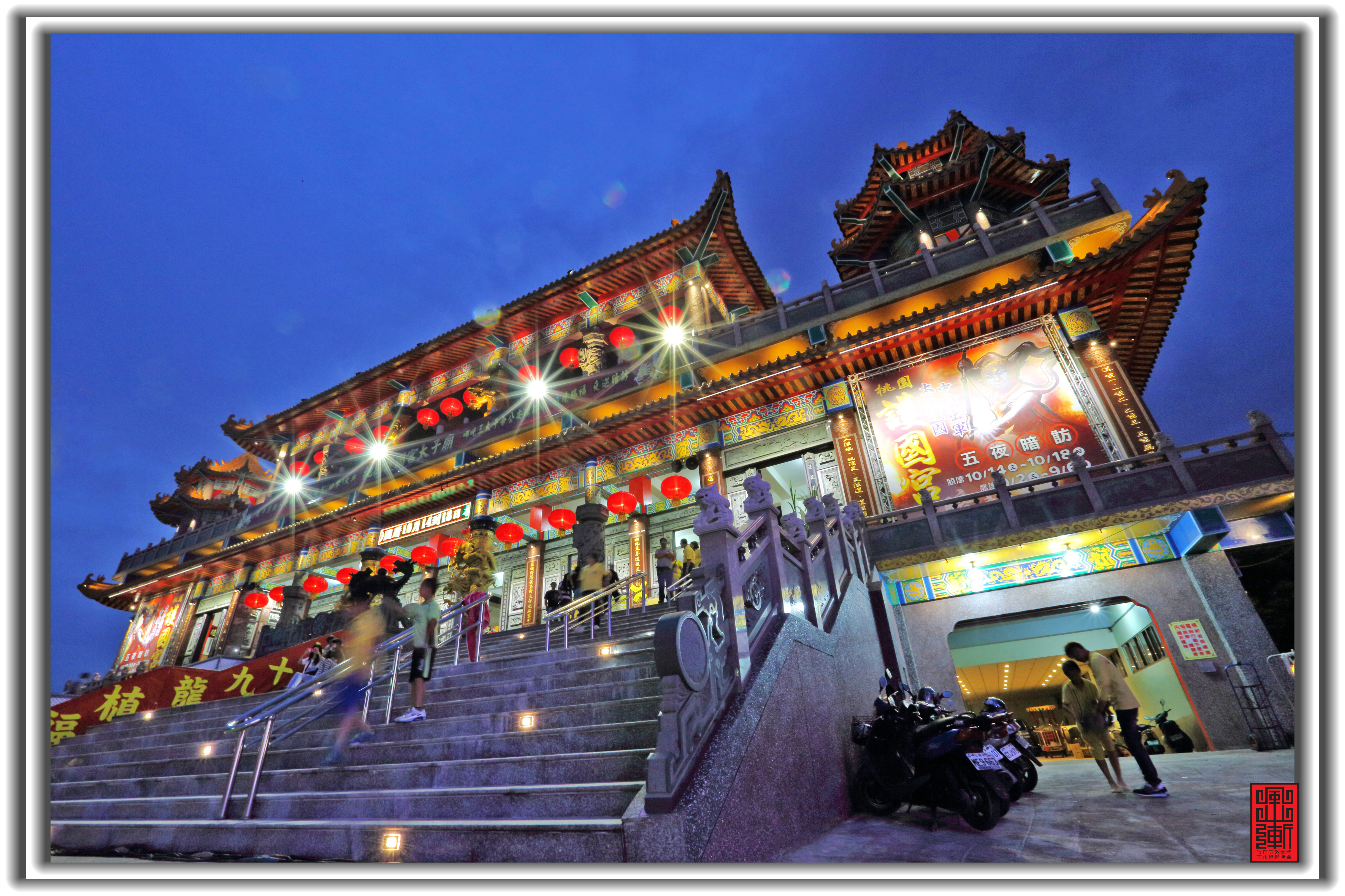 桃園護國宮目前為北台灣最大太子廟，建地共3600坪。